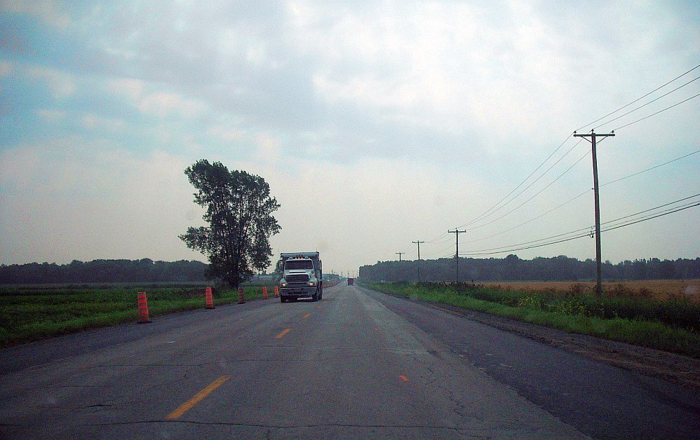 Vue sur la route 341, dans la ville de l'Épiphanie (région de Lanaudière), Québec, Canada.